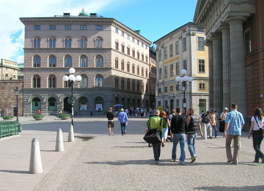 Mynttorget, Stockholm, Sweden.